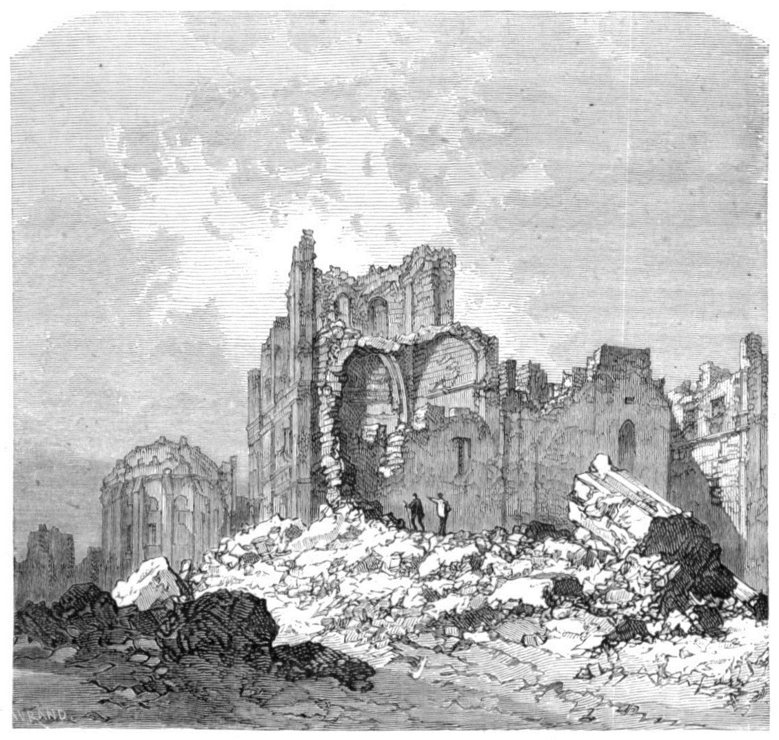 Lisbonne après le tremblement de terre de 1755. Illustration de "Histoires des météores", p. 404